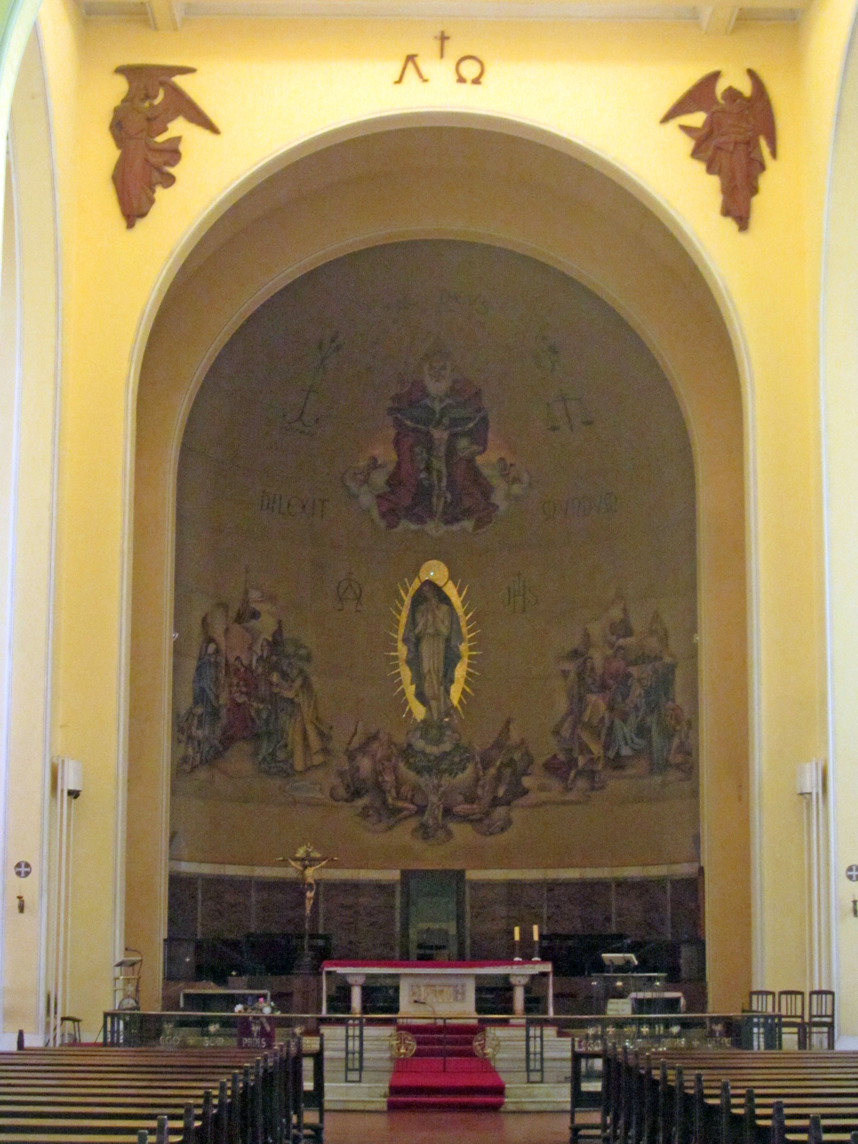 Altar de la Catedral de la Santísima Concepción Concepción, Chile